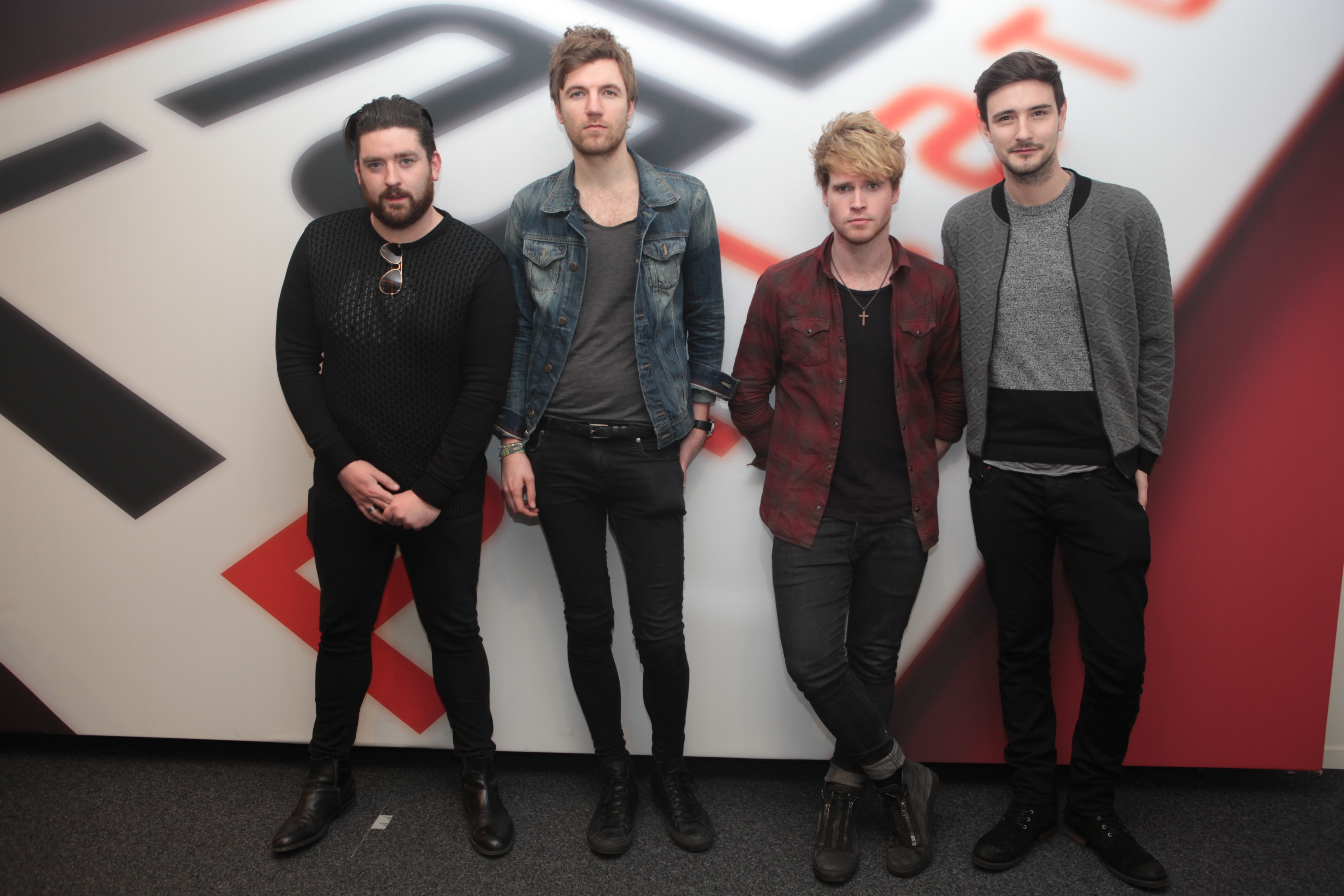 Die irische Band Kodaline bei Radio Pilatus